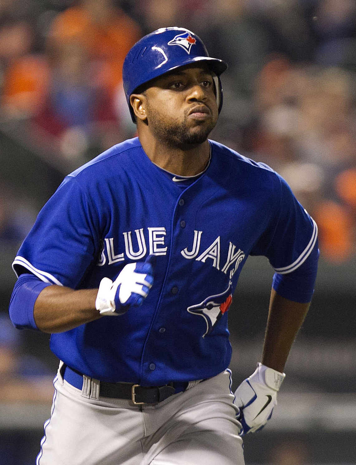 Ben Francisco